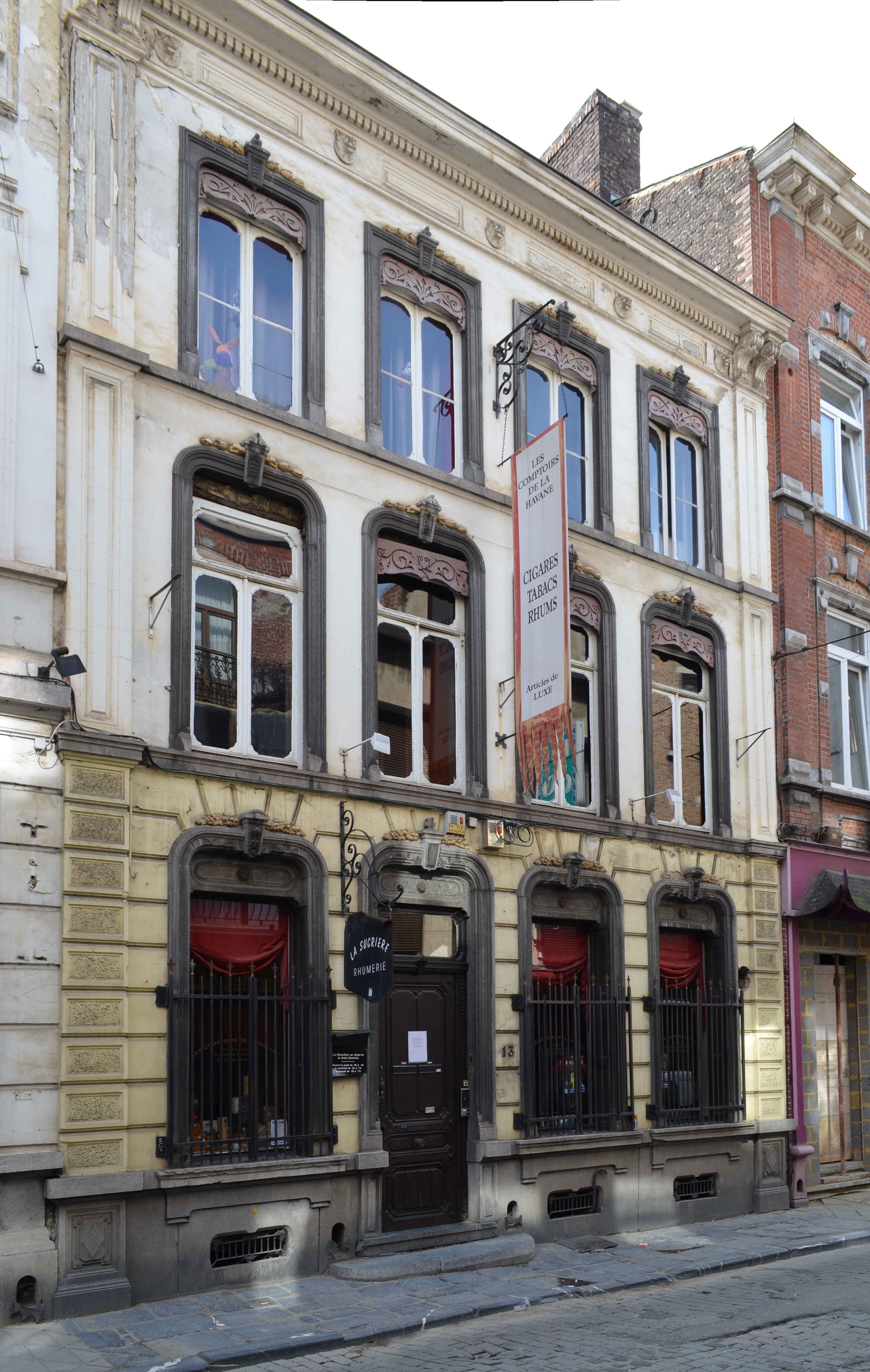 Charleroi (Belgique) - rue Charles Dupret n° 13. Maison natale de Charles Dupret (1818-1909). La façade néo-classique enduite fut aménagée par Auguste Cador, architecte, en 1863.